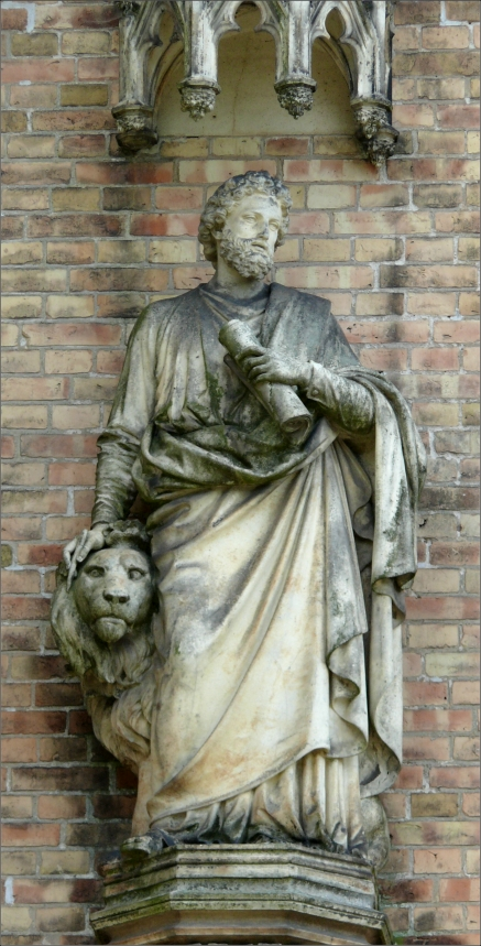 Evangelist Markus (Schlosskirche Neustrelitz)